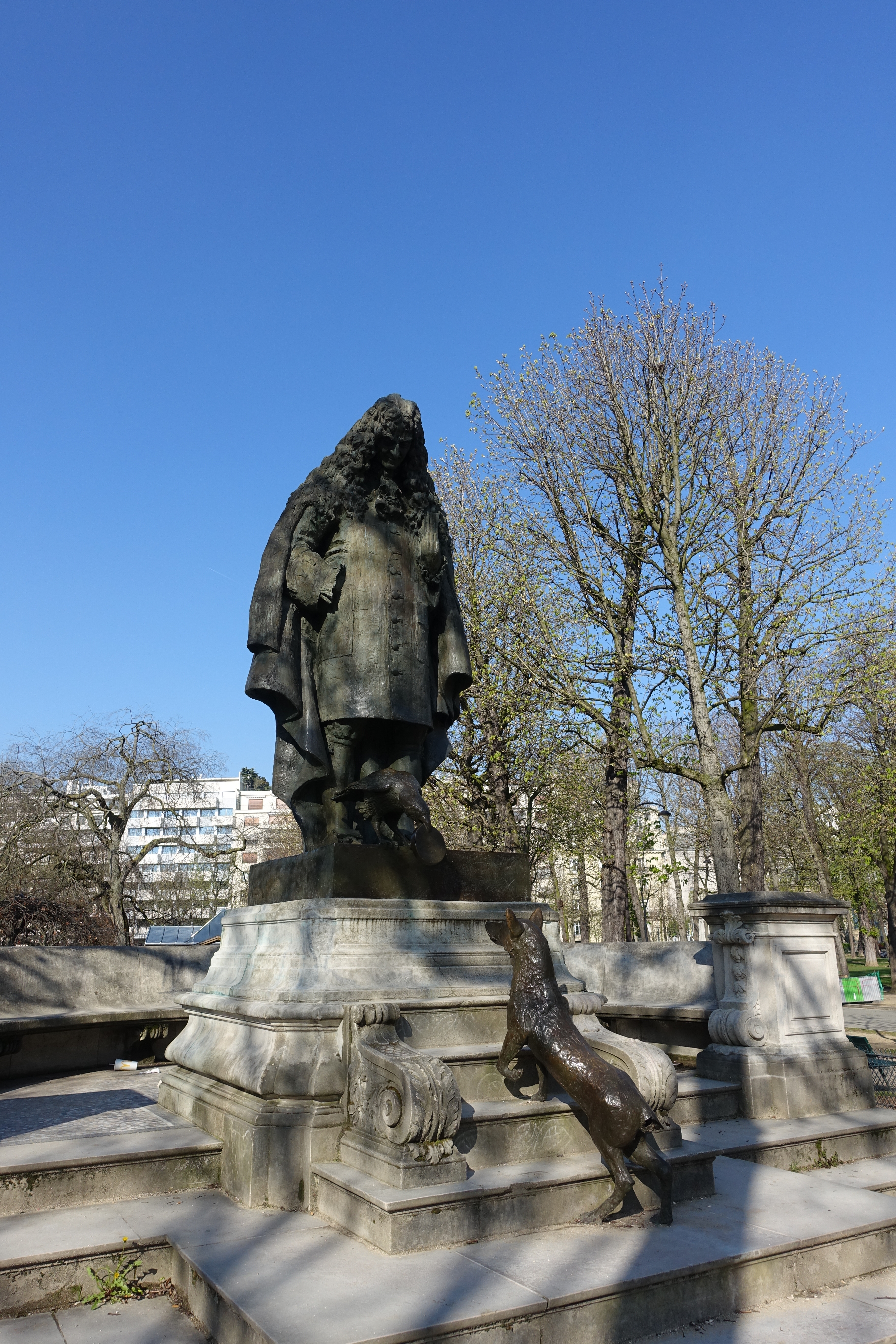 Statue of Jean de La Fontaine @Jardin du Ranelagh @ Paris